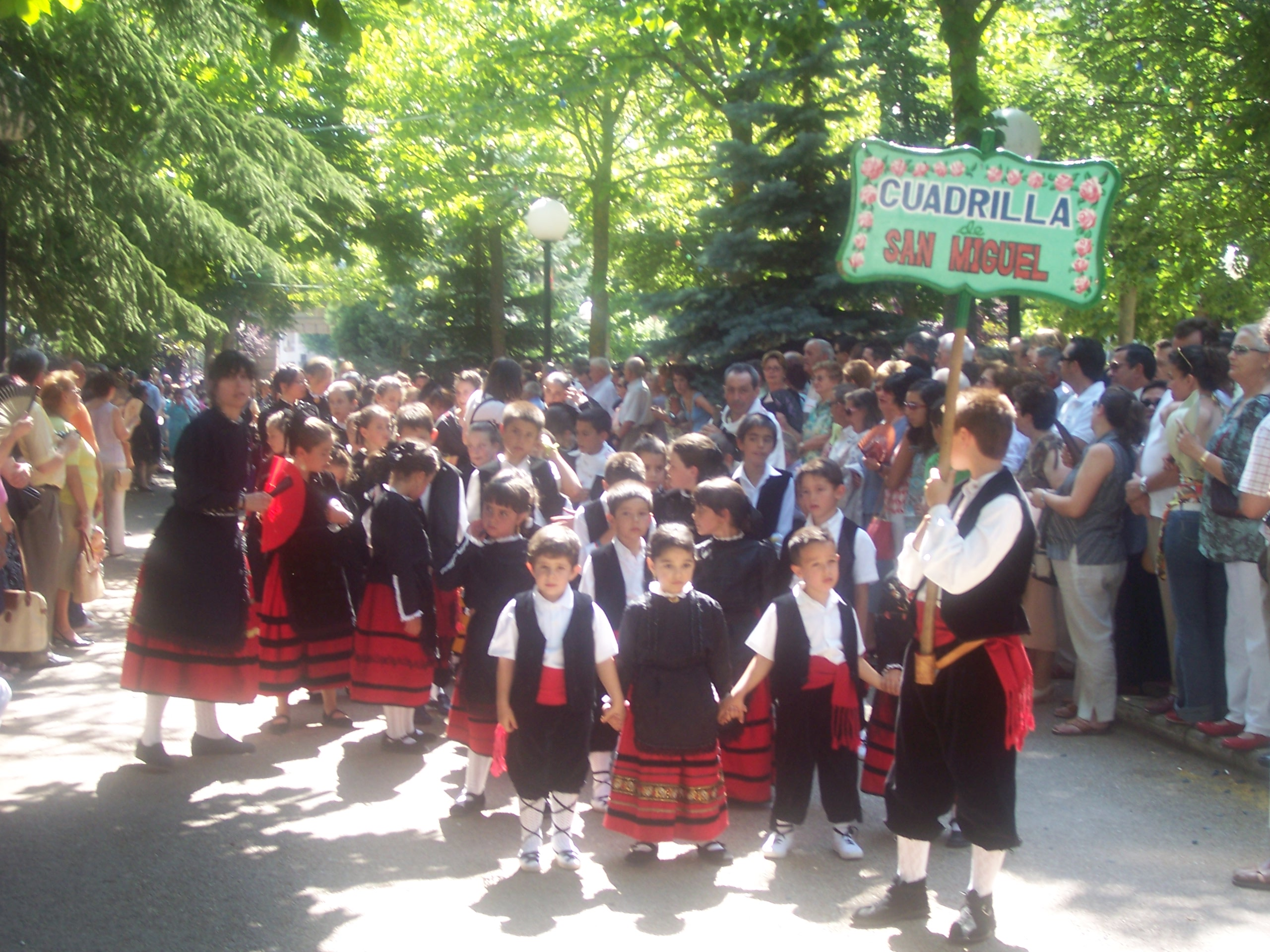 Procesión del Domingo de Calderas de las Fiestas de San Juan de Soria (España).